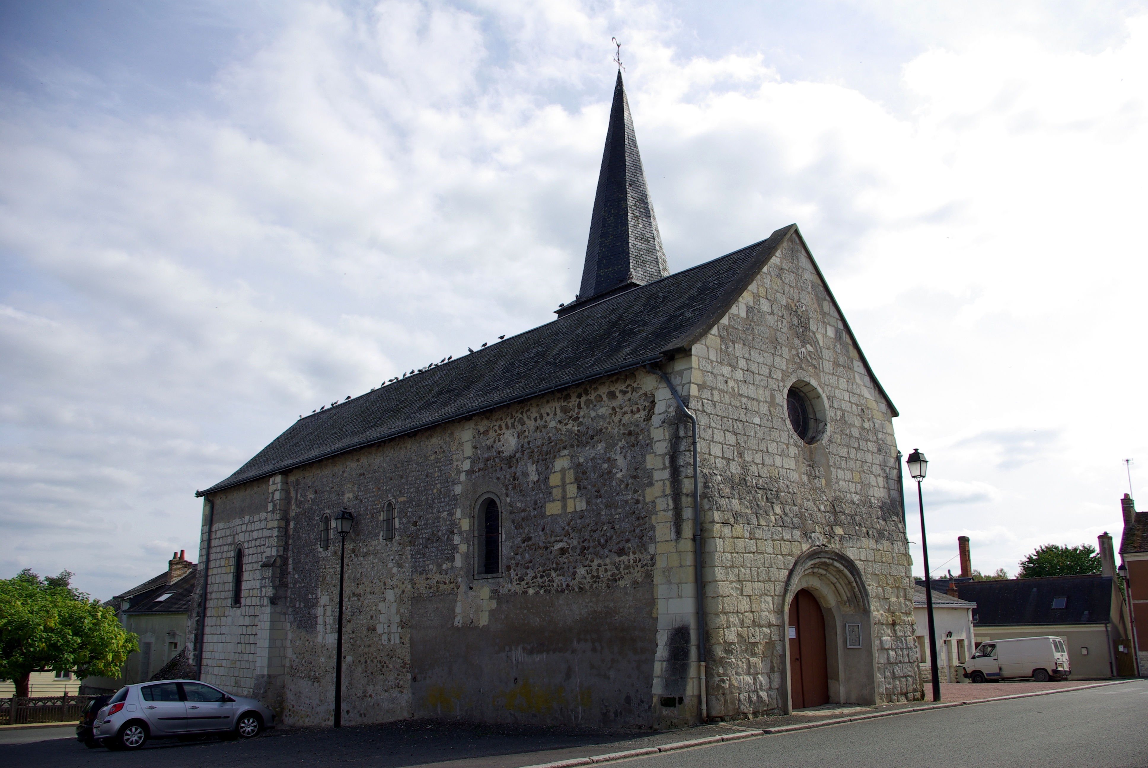 Église Saint-Aubin d'Avrillé-les-Ponceaux.